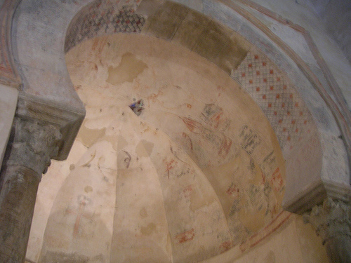 Santiago de Peñalba: pinturas.